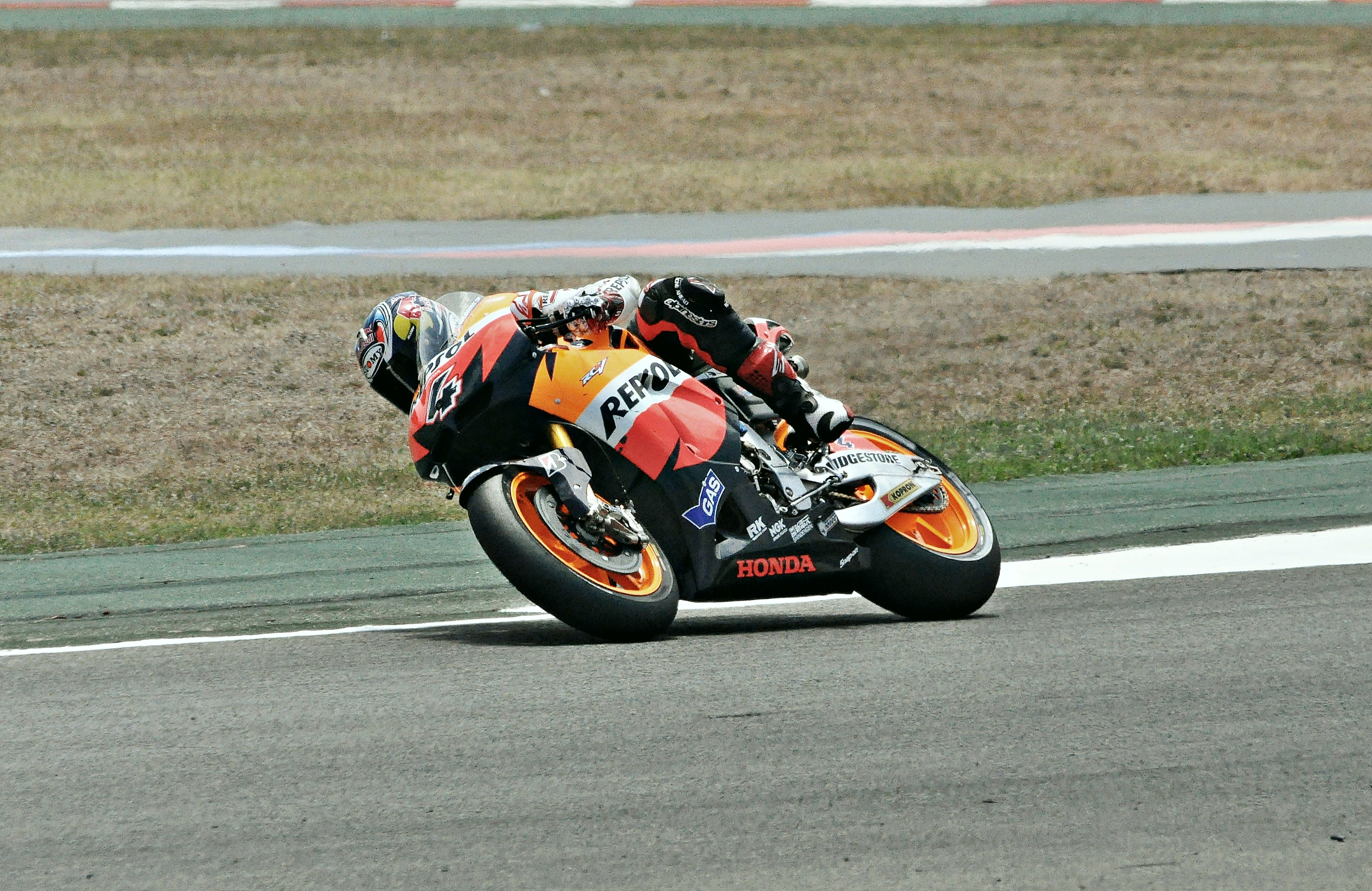 motogp circuito de cataluña-2010